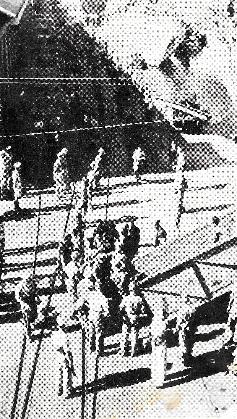 מעפילי לטרון מועלים לאניית הגירוש בנובמבר 1946